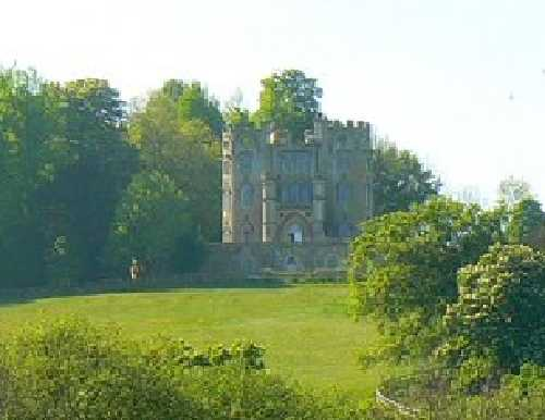 Midford Castle, near Midford, Somerset